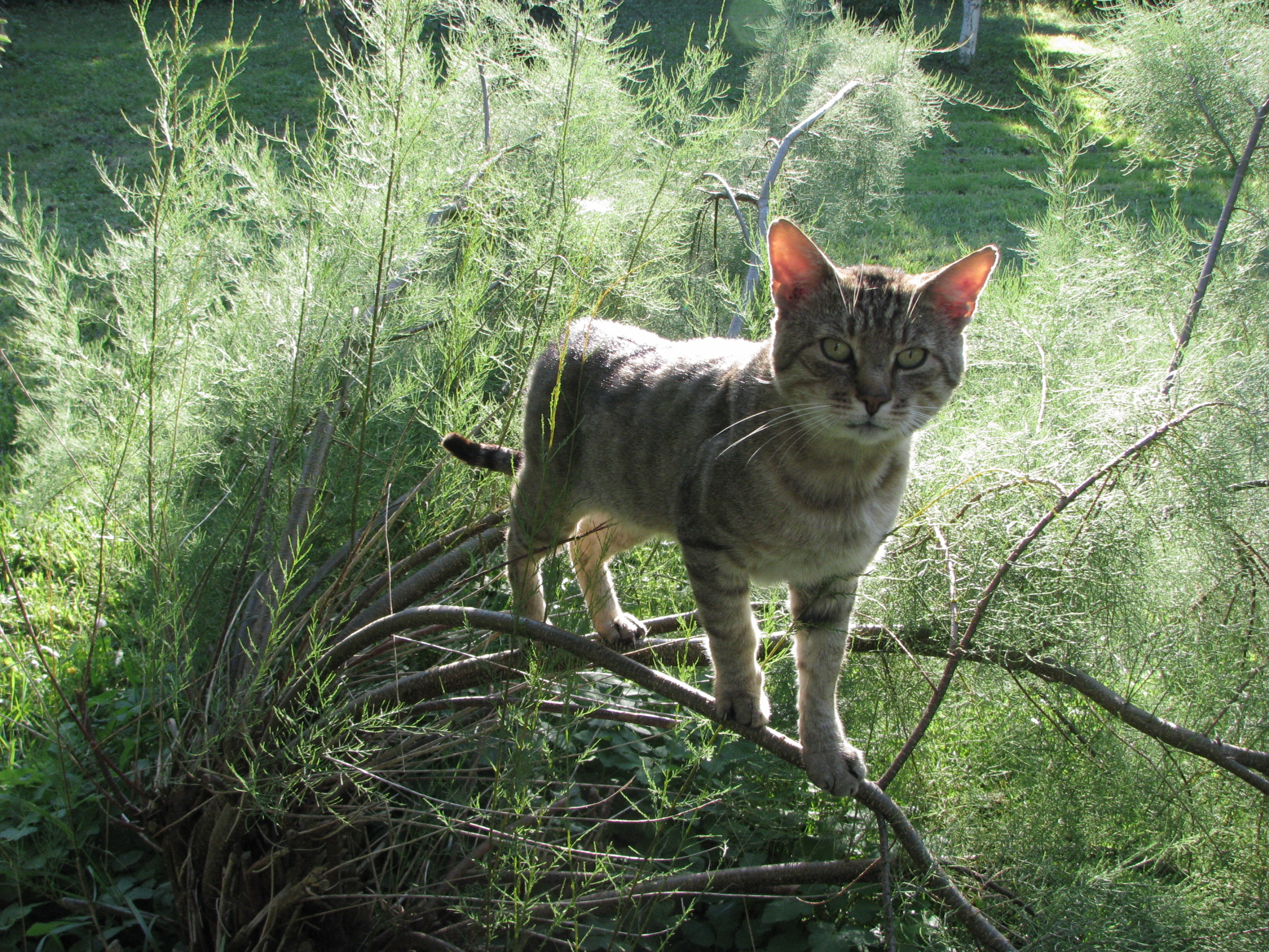 Kot domowy